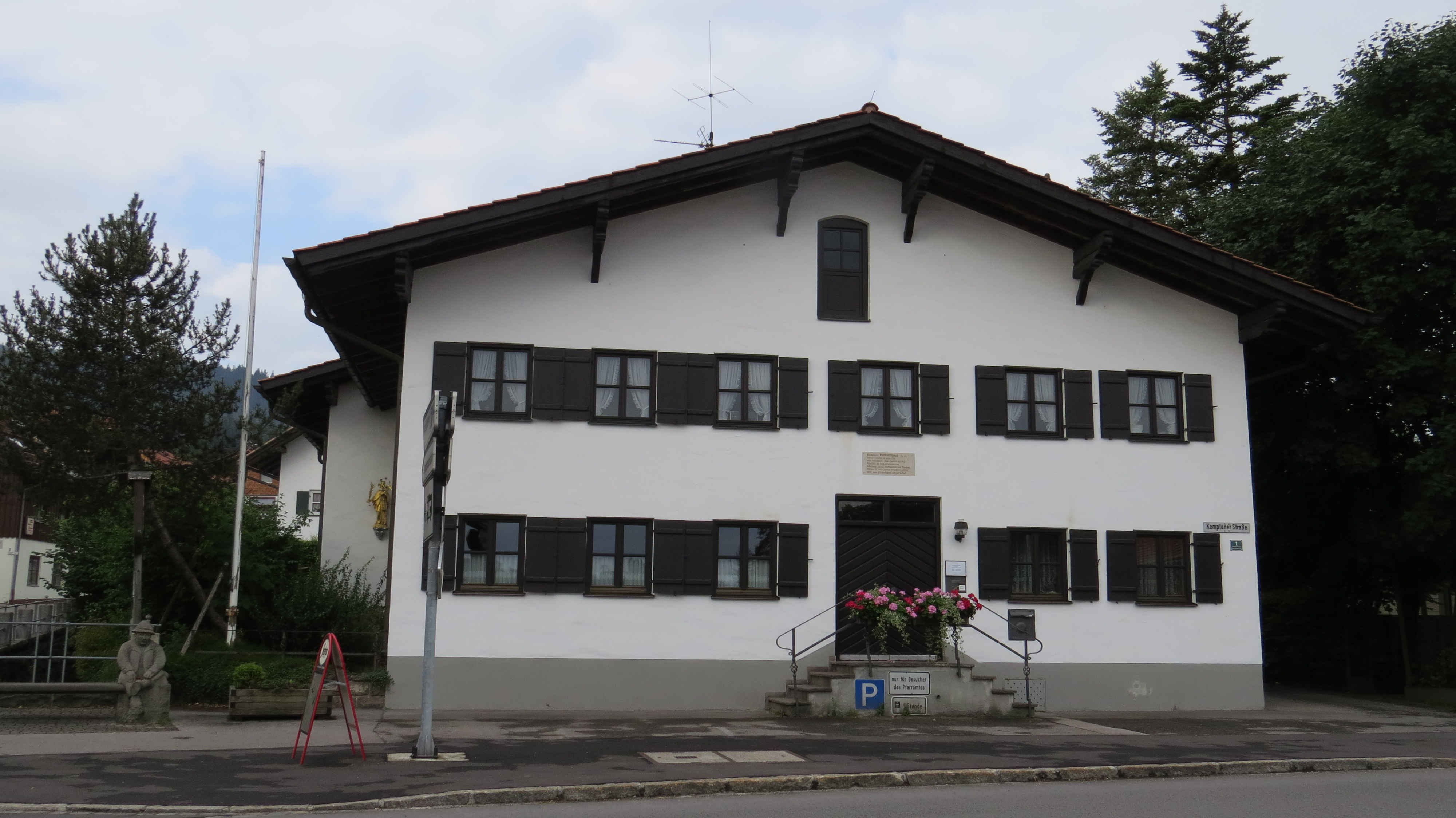 Pfarrhof in Nesselwang